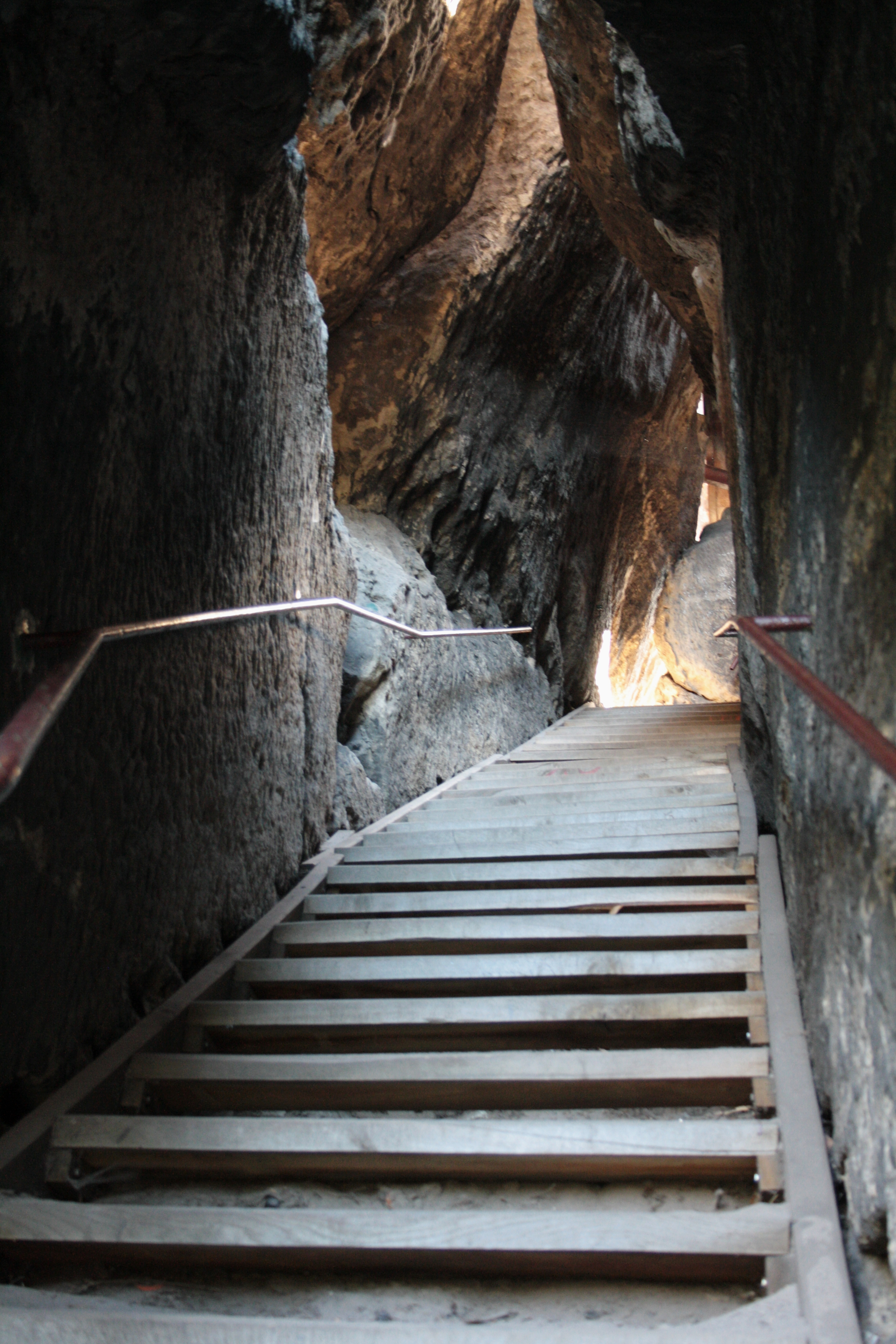 Mariina skála